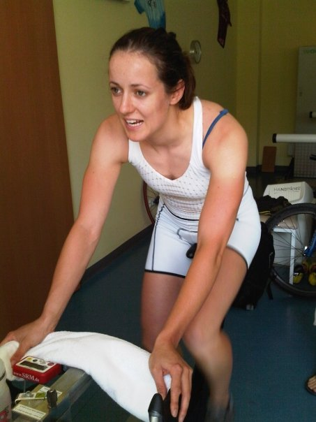 See Title